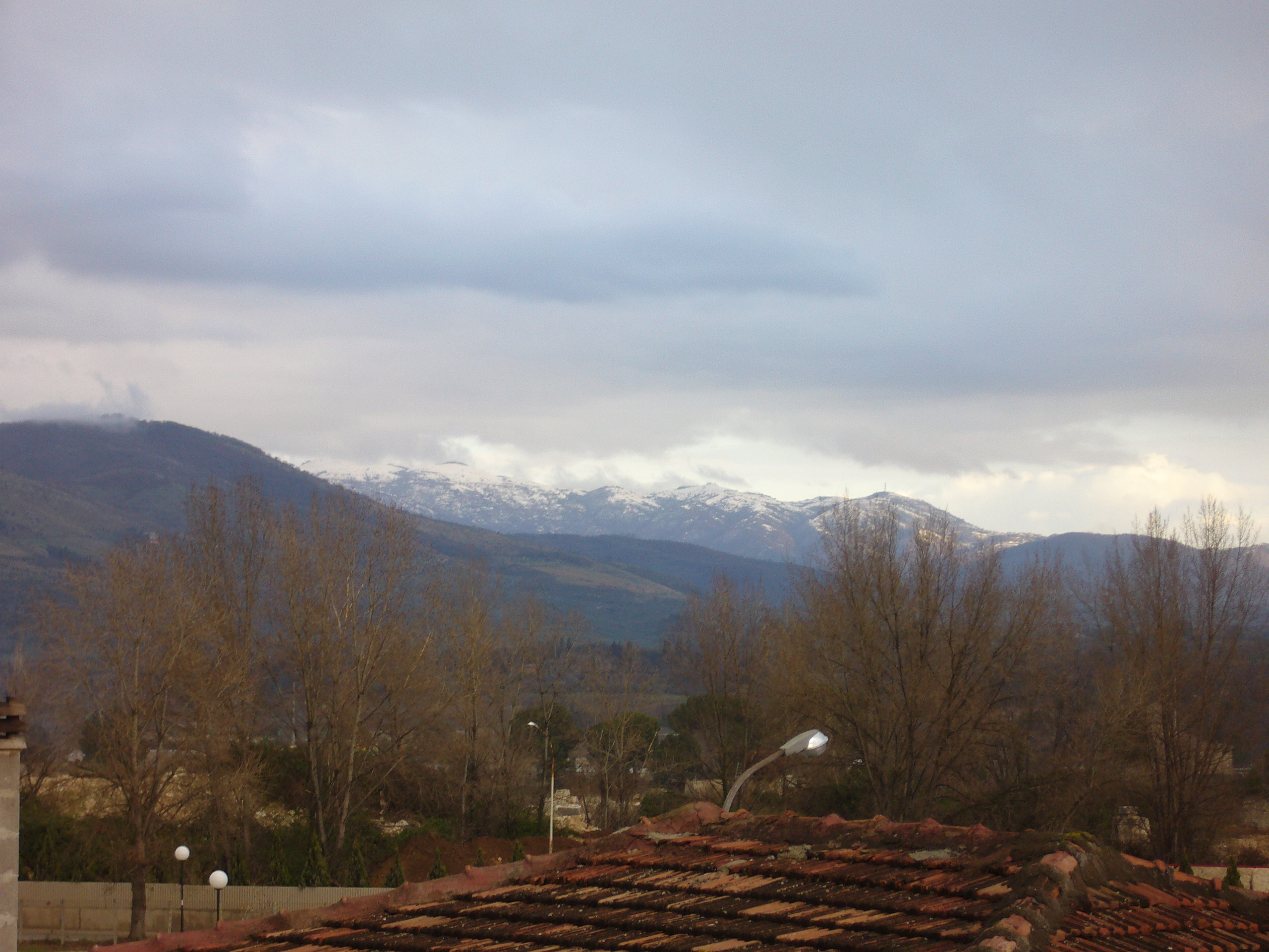 Versante nord-ovest dei Monti Prenestini, visti da Villalba di Guidonia Montecelio (RM)